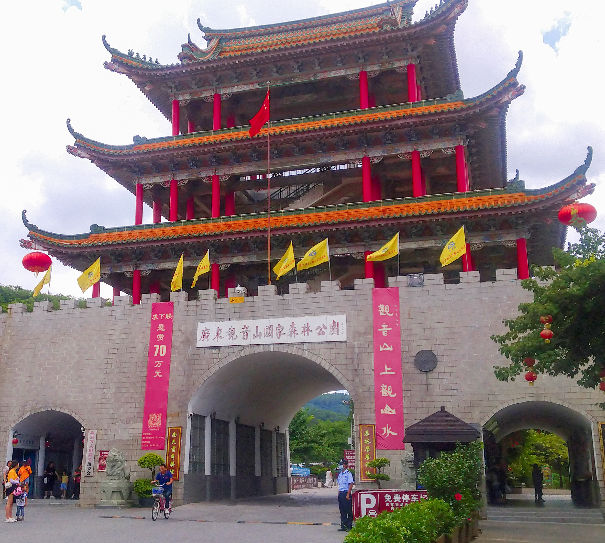 从售票通道侧面拍摄